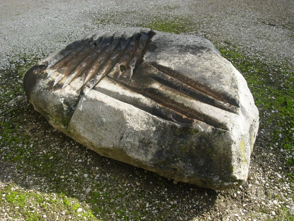 Polissoir Préhistoire Néolithique Ossey-les-Trois-Maisons Aube France Musées de Troyes